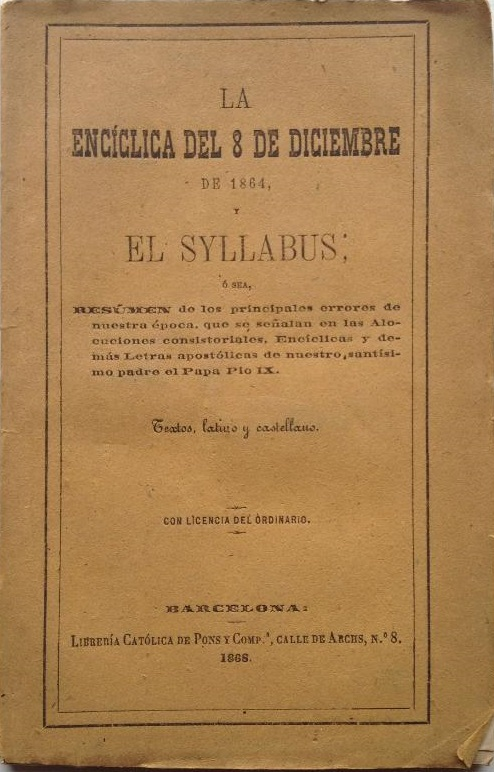 El Syllabus